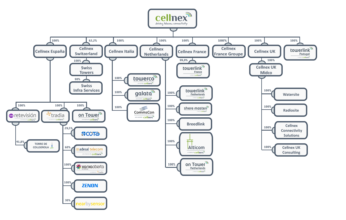 Quienes somos